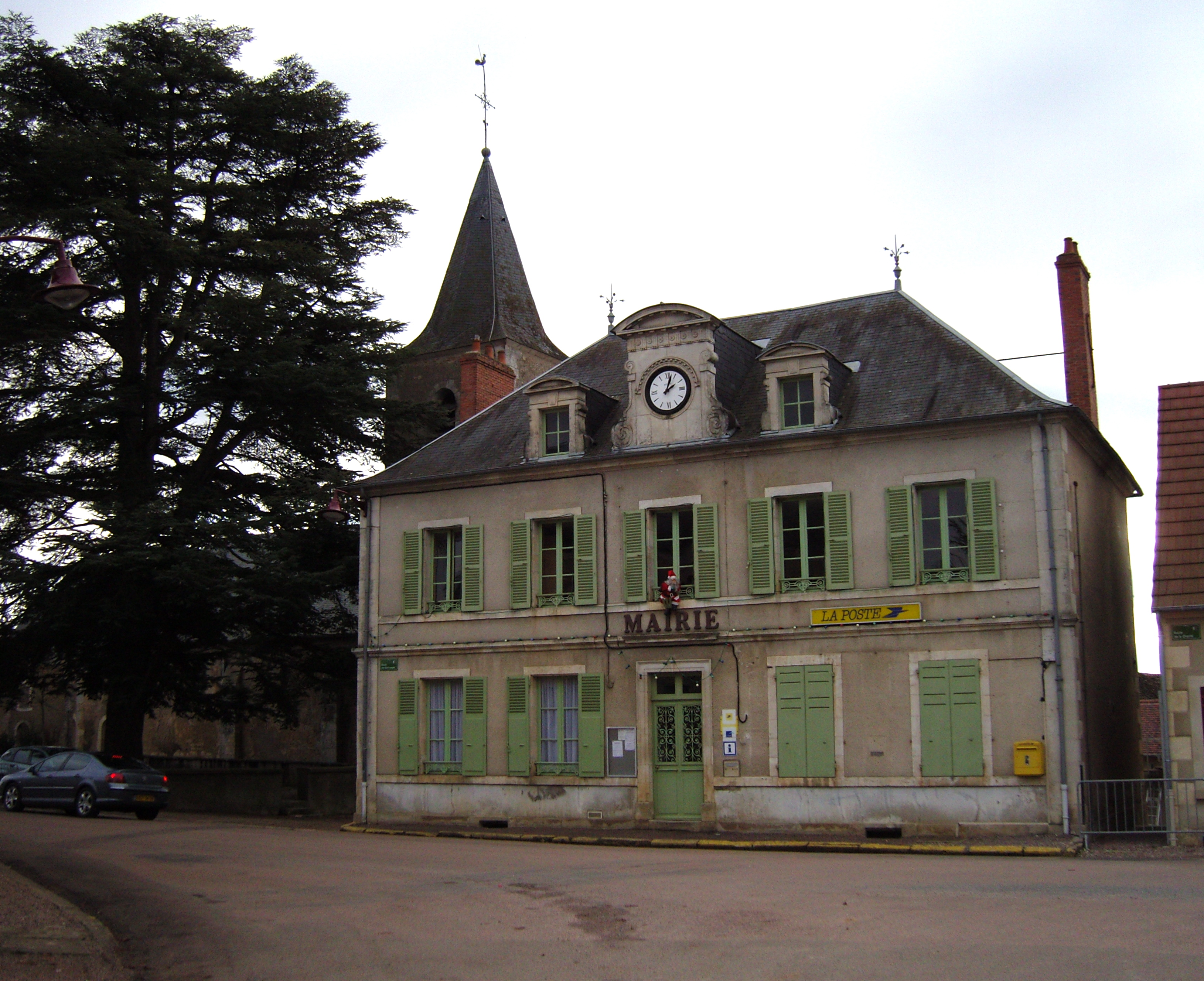 Mairie de la commune Raveau, située dans le département de la Nièvre